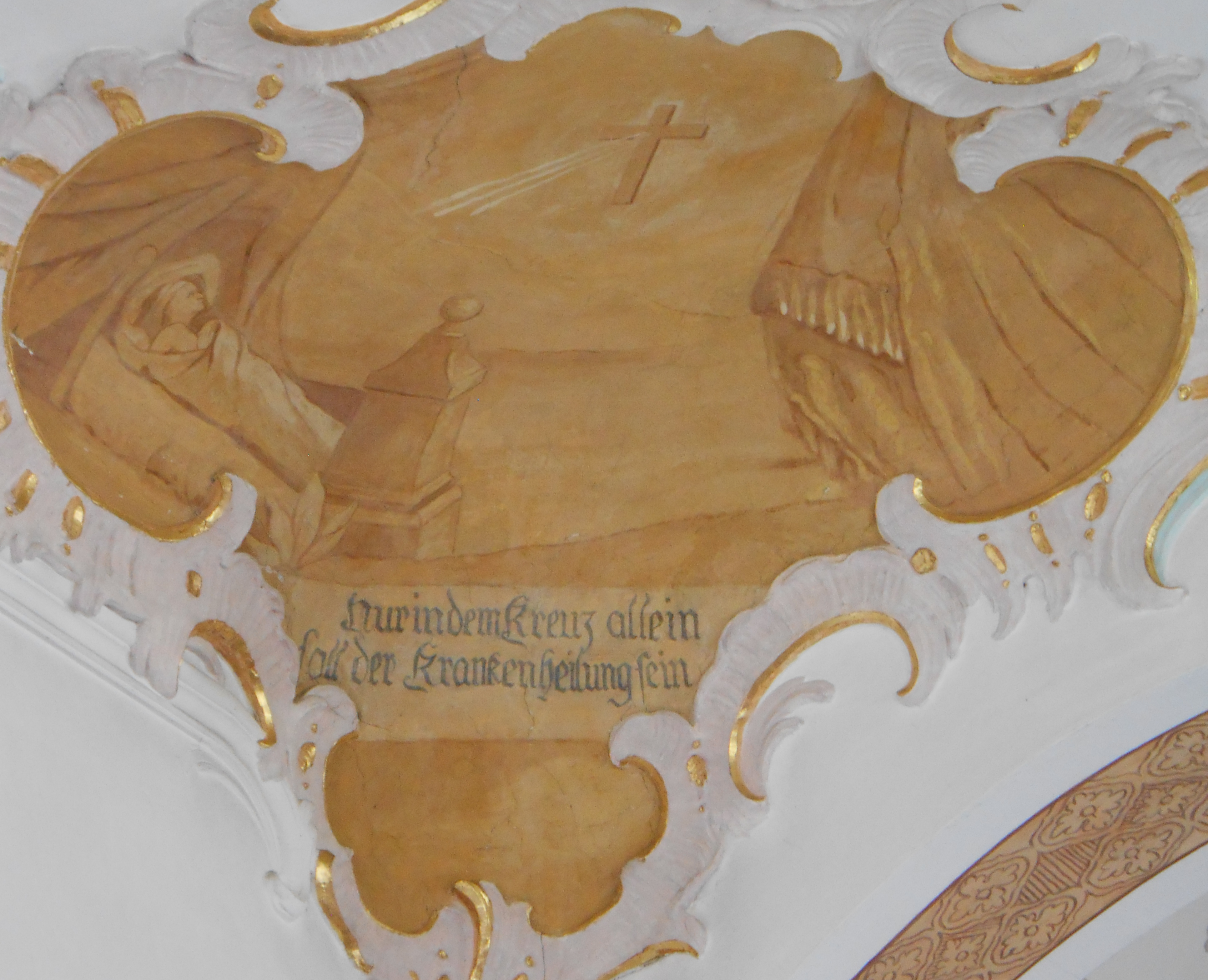 Deckengemälde von Heilig Kreuz (Mindelaltheim)